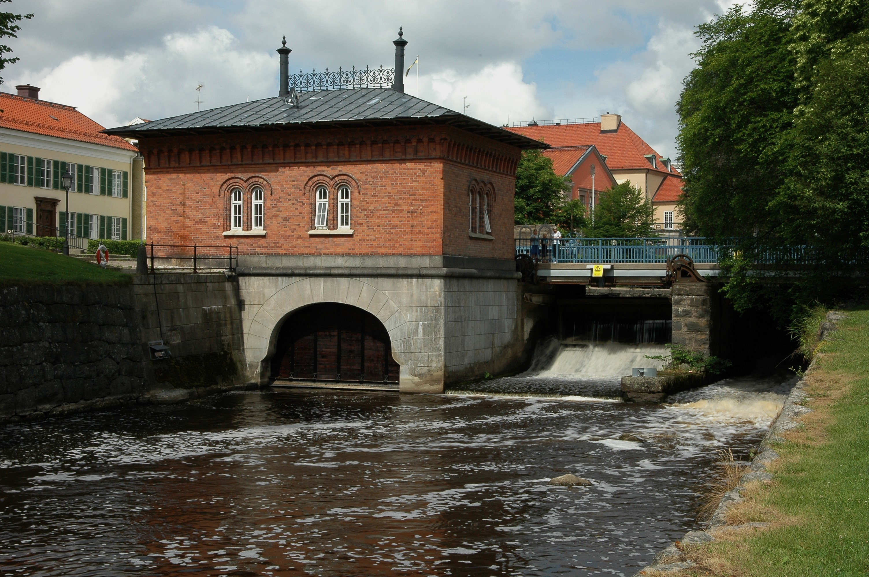 Turbinhuset, Västerås